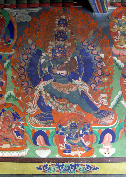 Monestir (Gompa) de Lamayuru, a Ladakh, estat de Jammu i Caixmir, Índia